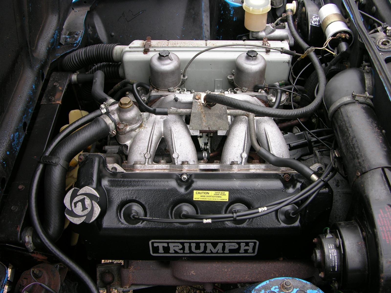 1974 Triumph Dolomite Sprint